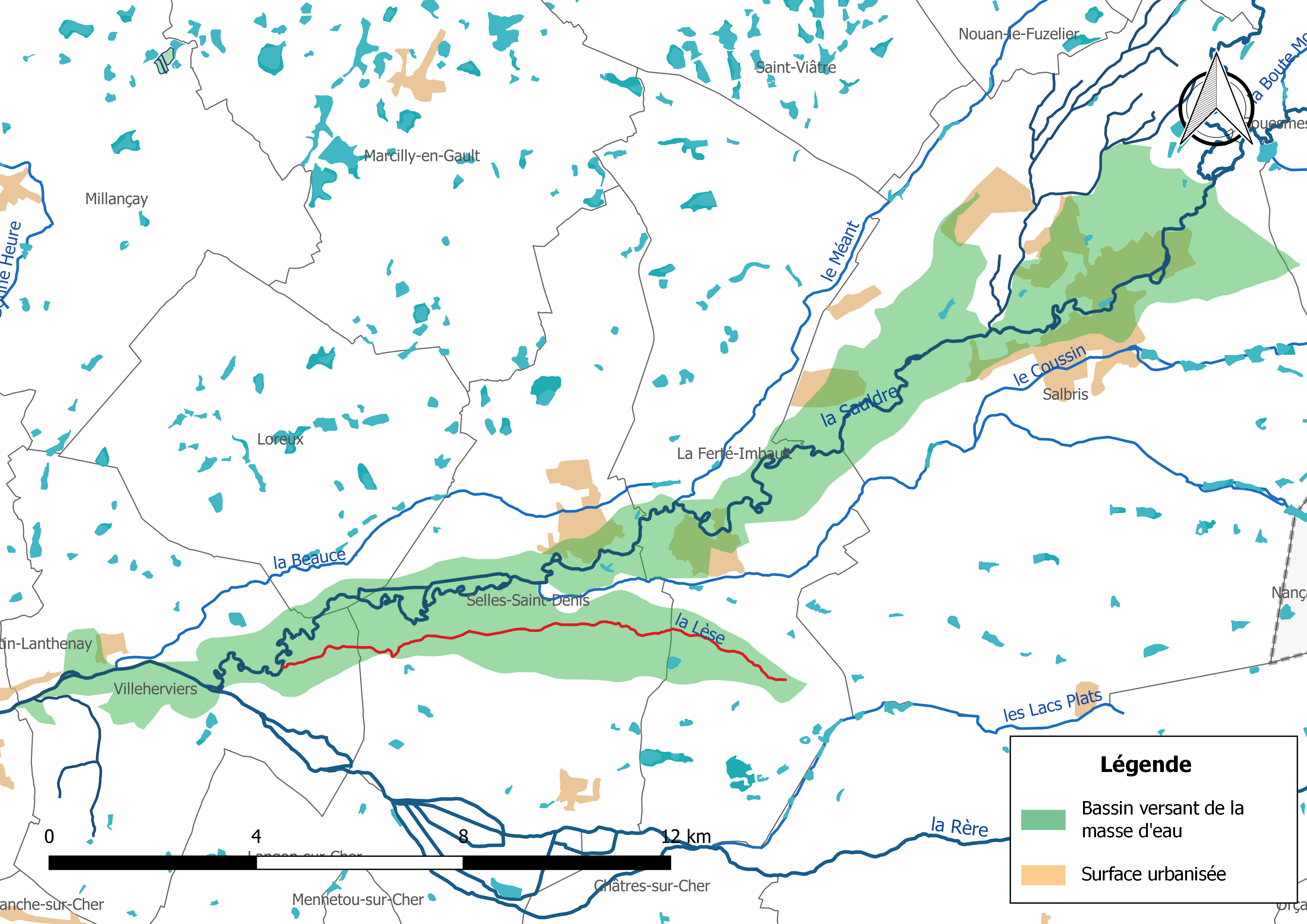 Carte de de la masse d'eau FRGR0337a « la Sauldre » et de son bassin versant, avec mise en exergue de la Lèse.